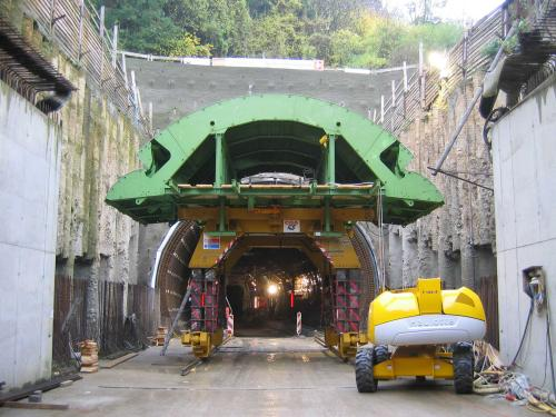 Bauarbeiten im Zuge des Schlossbergtunnel